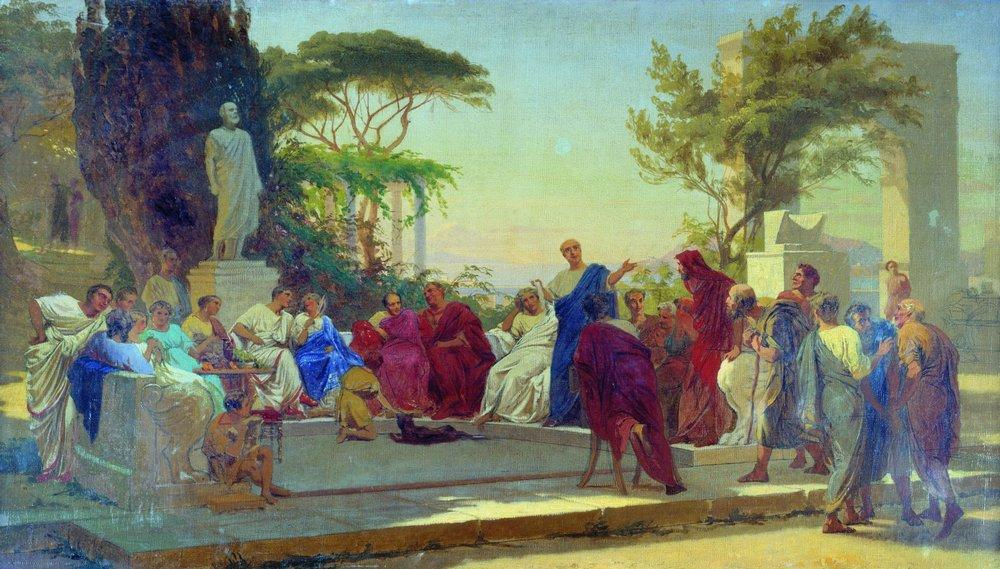 Horatius reads before Maecenaslabel QS:Len,"Horatius reads before Maecenas" label QS:Lfr,"Horace lit ses poèmes devant Mécène" label QS:Lru,"Федор Бронников. Гораций читает свои сатиры меценату."